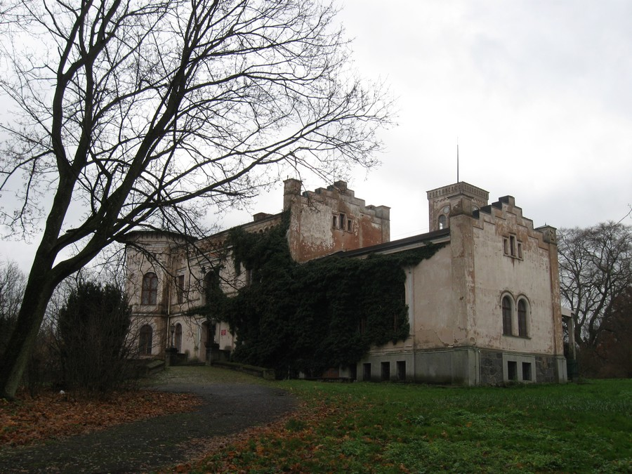 Mełno, pałac